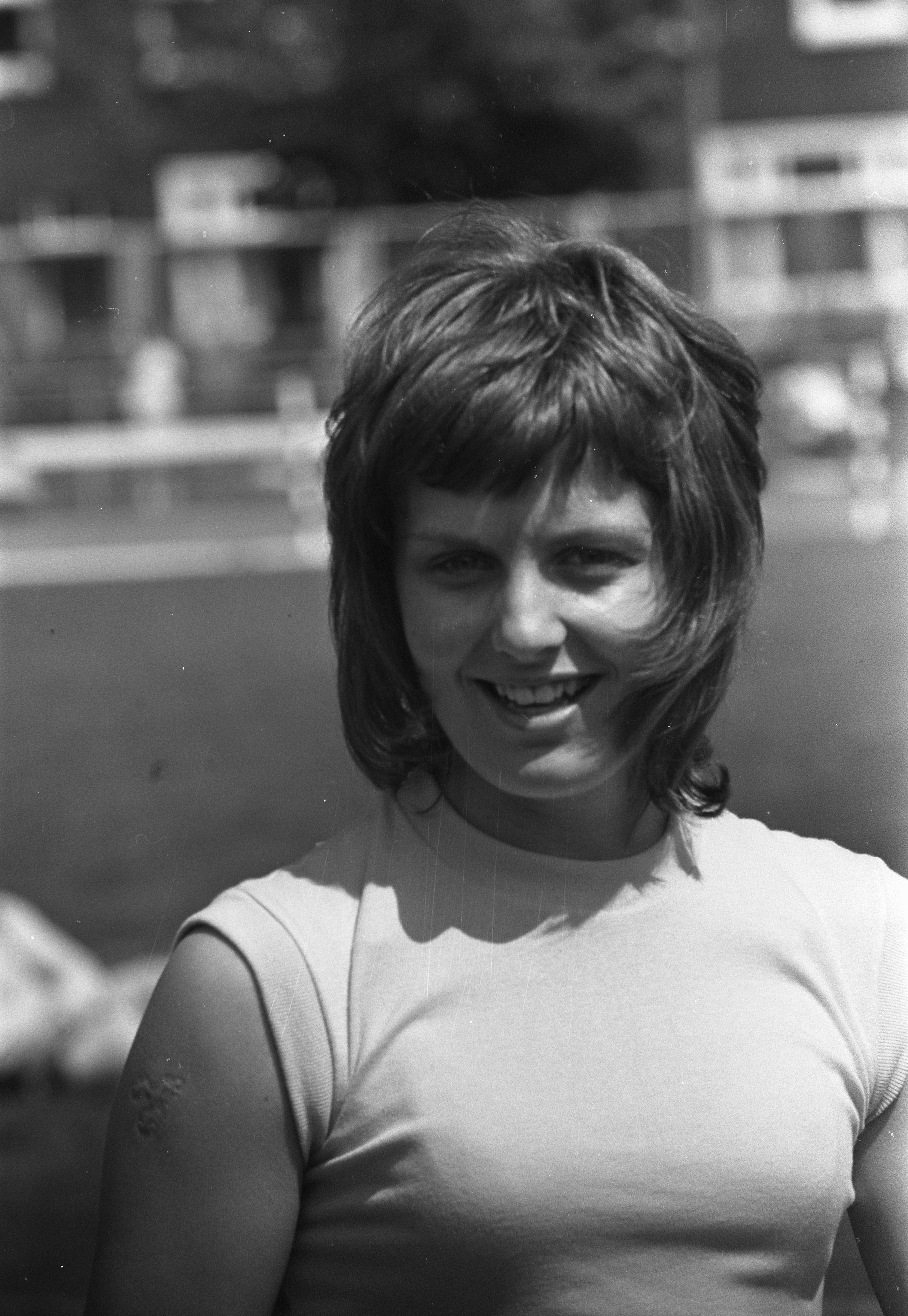 Collectie / Archief : Fotocollectie Anefo Reportage / Serie : [ onbekend ] Beschrijving : Vijf districtswedstrijden atletiek in Amsterdam, Lida Kuys (Lida Berkhout-Kuijs) verbeterde Nederlands record speerwerpen (kop) Datum : 27 mei 1973 Locatie : Amsterdam, Noord-Holland Trefwoorden : ATLETIEK, SPEERWERPEN Fotograaf : Punt, […] / Anefo Auteursrechthebbende : Nationaal Archief Materiaalsoort : Negatief (zwart/wit) Nummer archiefinventaris : bekijk toegang 2.24.01.05 Bestanddeelnummer : 926-4371